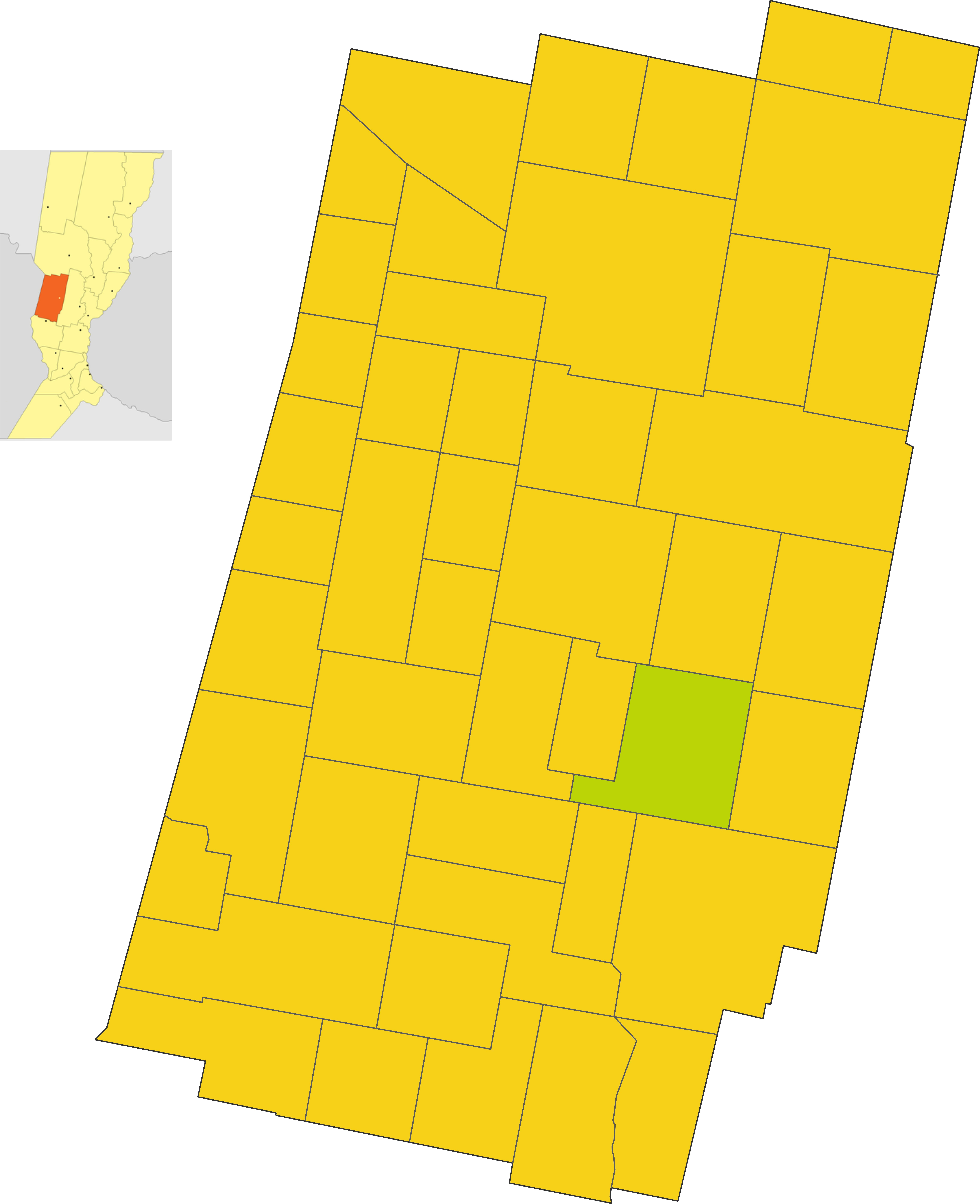 Map of the comuna de Susana in Castellanos department, Santa Fe province, Argentina